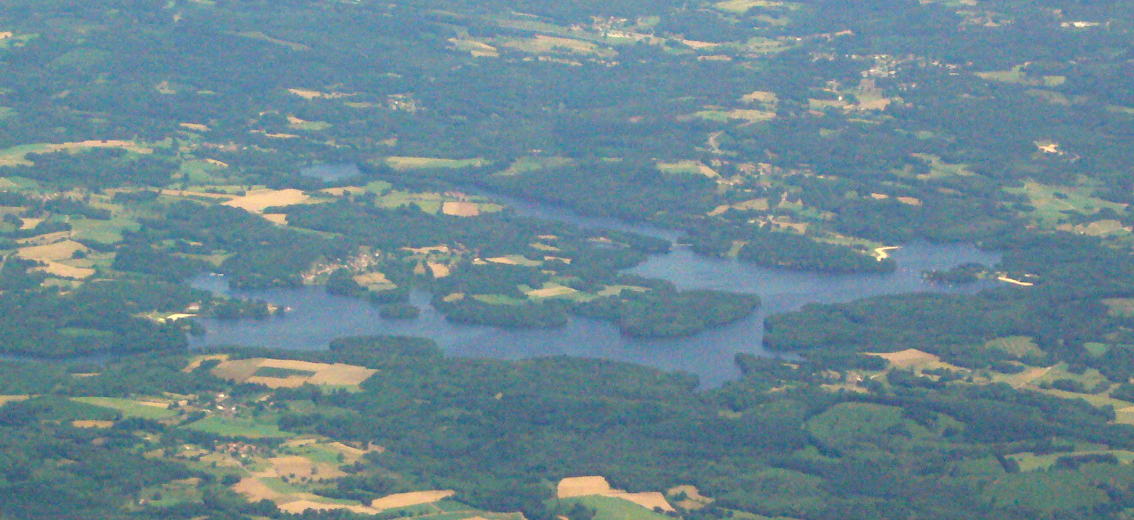 Luftbild des Lac de Saint-Pardoux